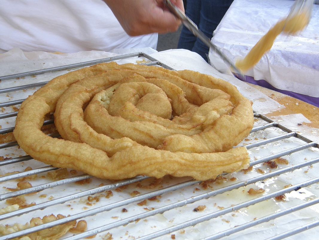 Portugiesische Spezialität Farturas